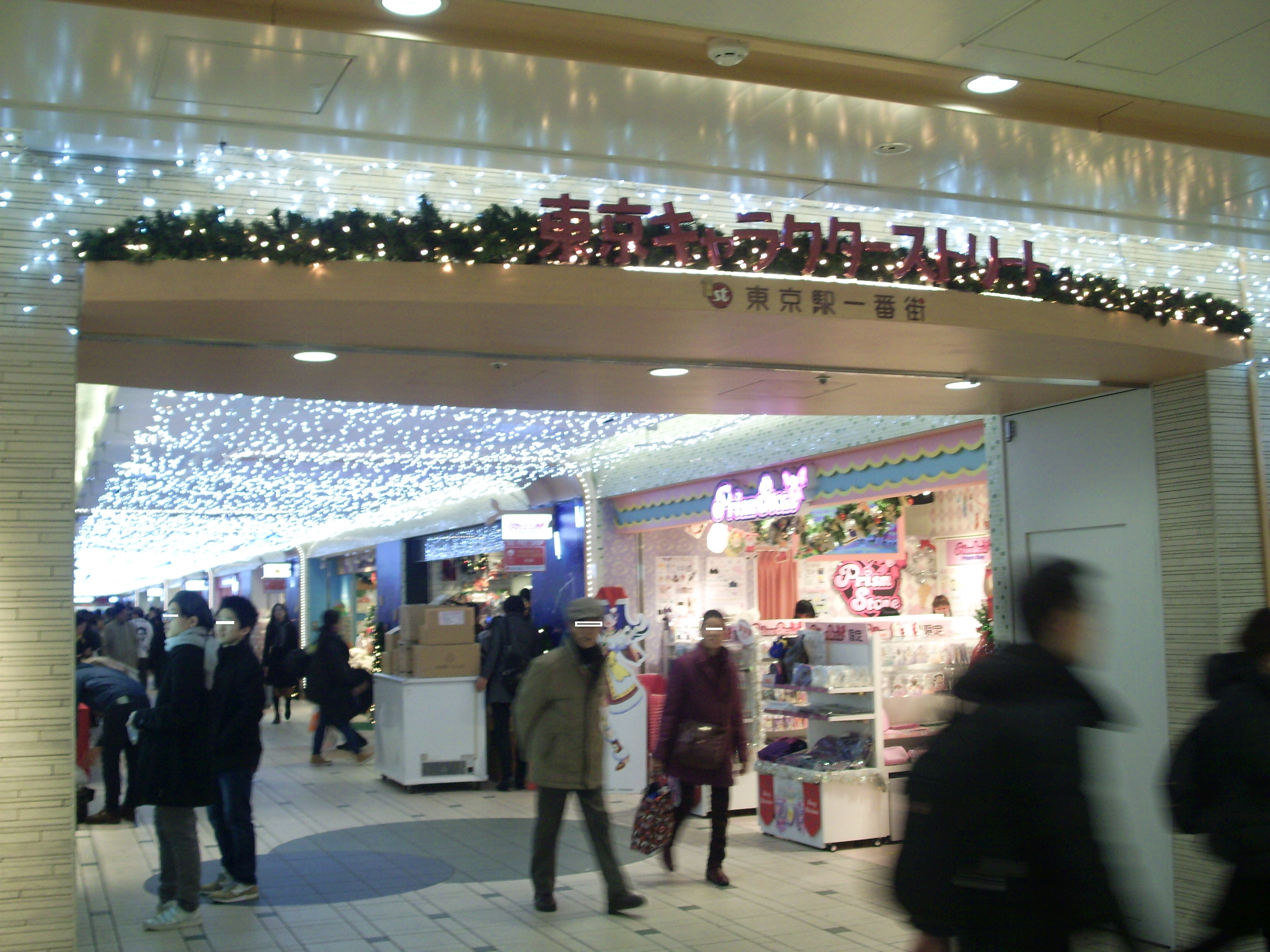 東京駅八重洲口側でJR東海系の東京ステーション開発㈱が運営する東京駅一番街の東京キャラクターストリート ㊟カメラを起動すると日付機能が出荷時のものに初期化されるため、ファイル履歴の撮影・投稿日時とメタデータの原画像データの生成日時が異なります